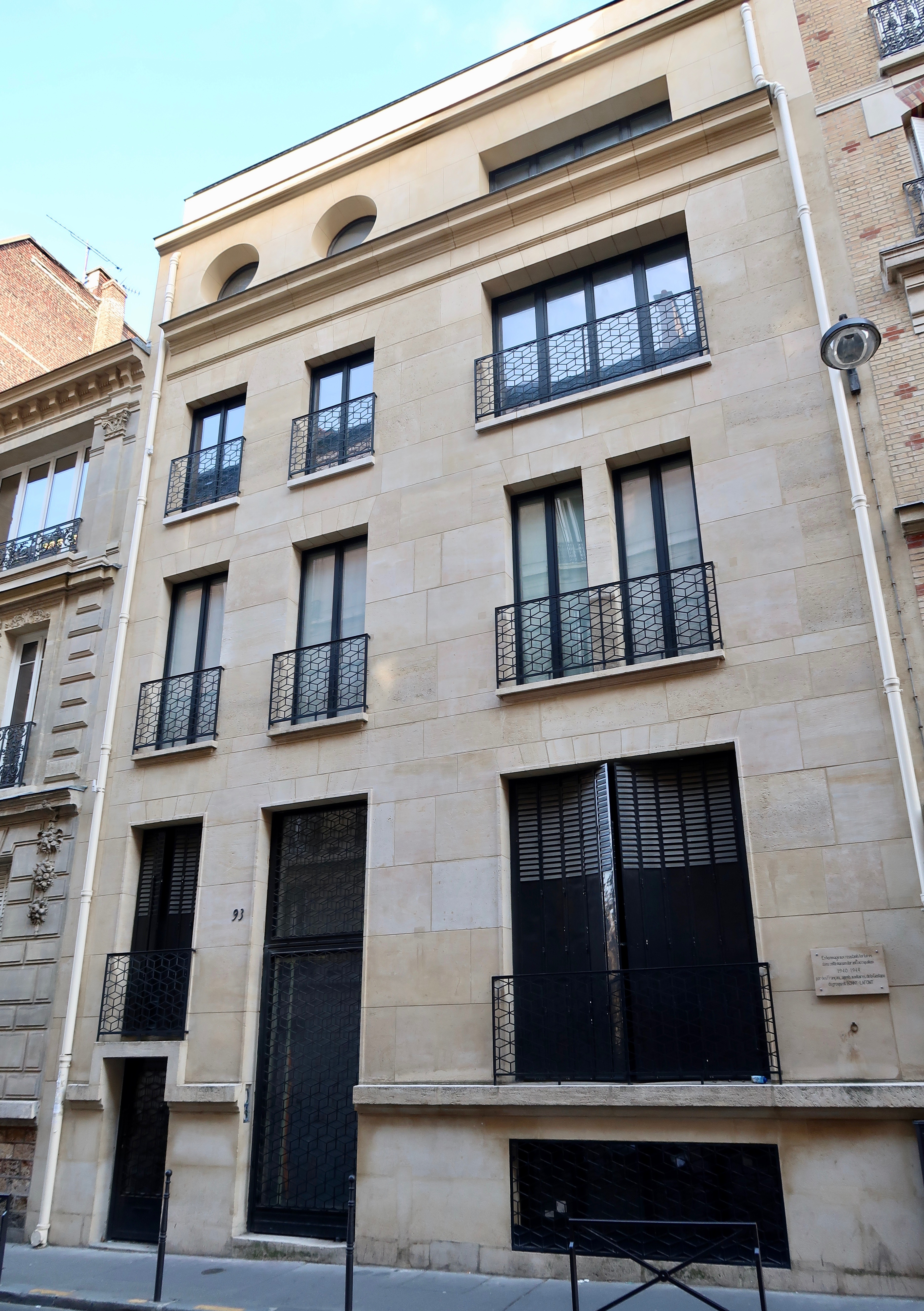 Ex-siège de la Gestapo, 93 rue Lauriston (Paris, 16e).